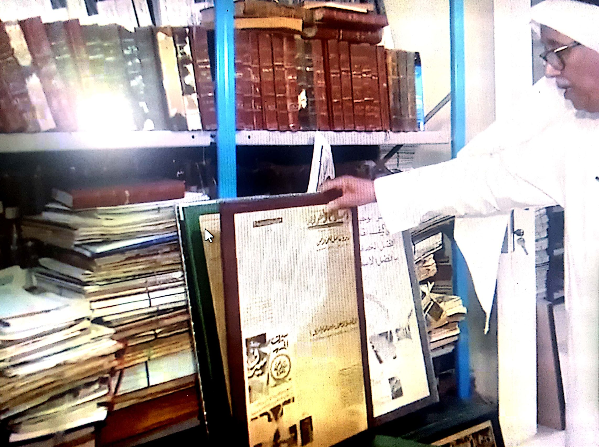 صورة